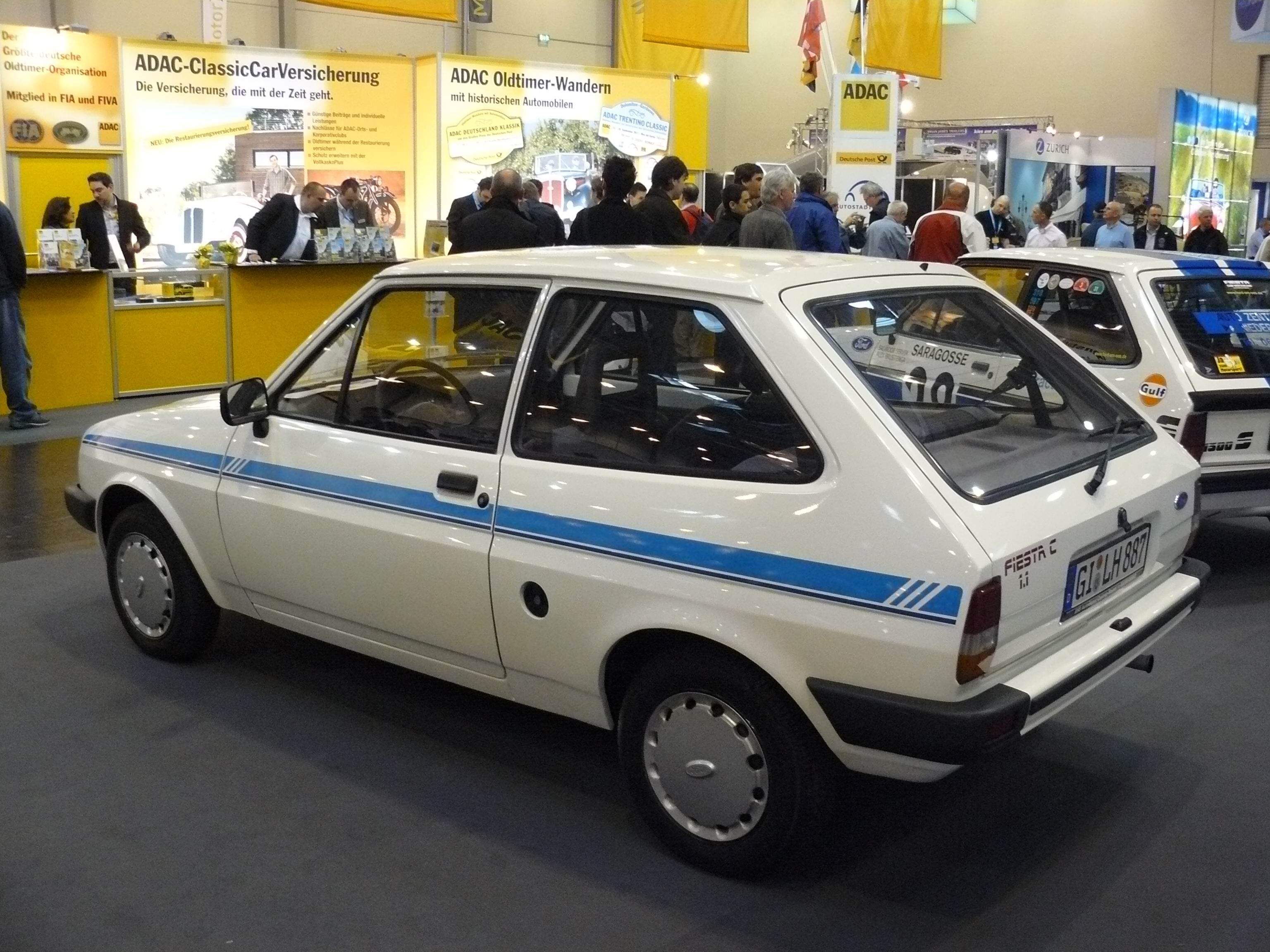 Essen 2011